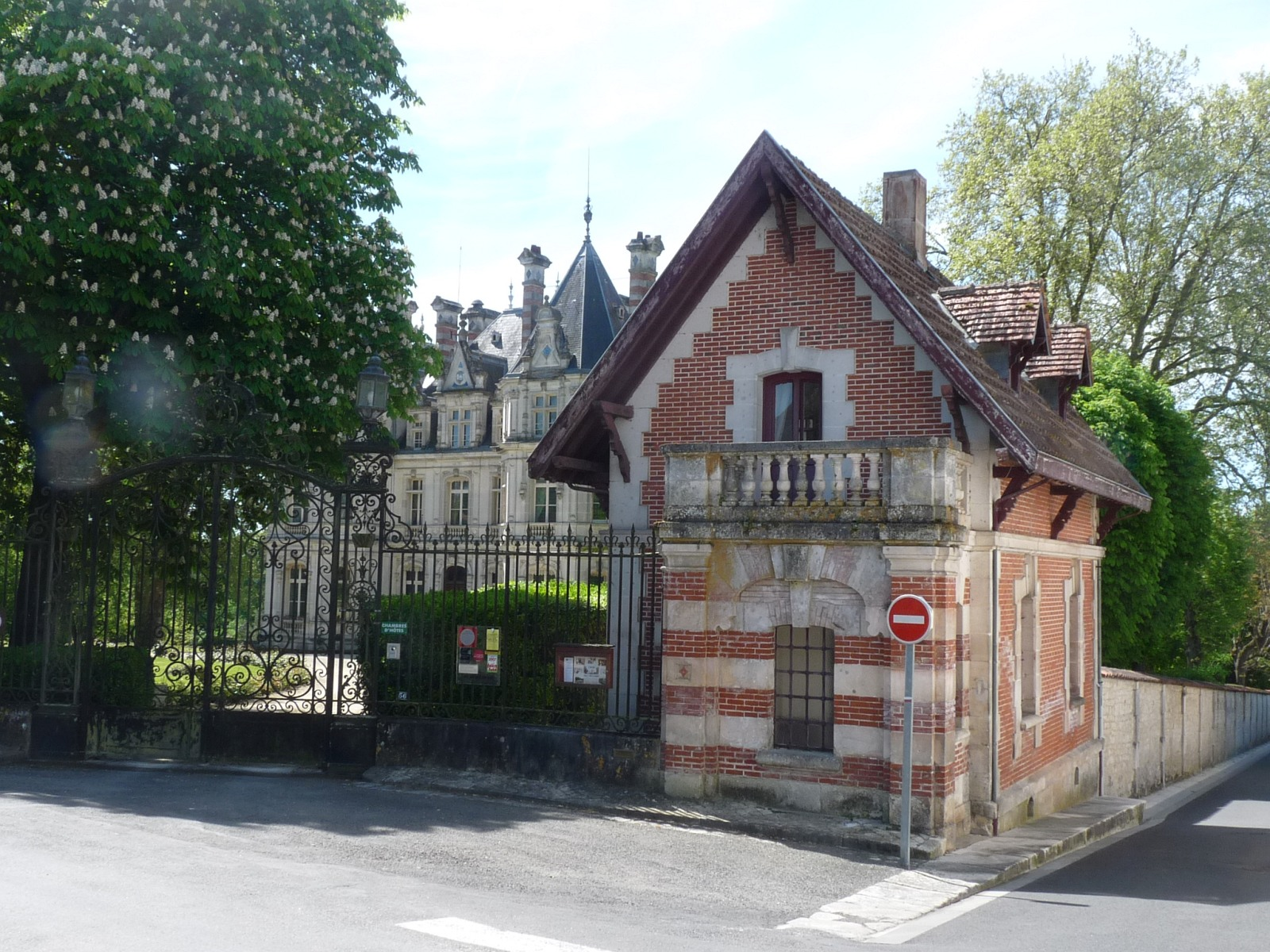 Entrée du château Saint-Martial, Jarnac, Charente, France